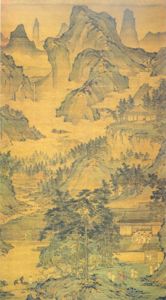 Villa dans les montagnes (détail-1) par Sheng Mao (1310-1360) ou un de ses disciples (fausse signature de Zhao Mengfu), rouleau mural, encre et couleur sur soie. 209x116cm. Musée du palais, Beijing.